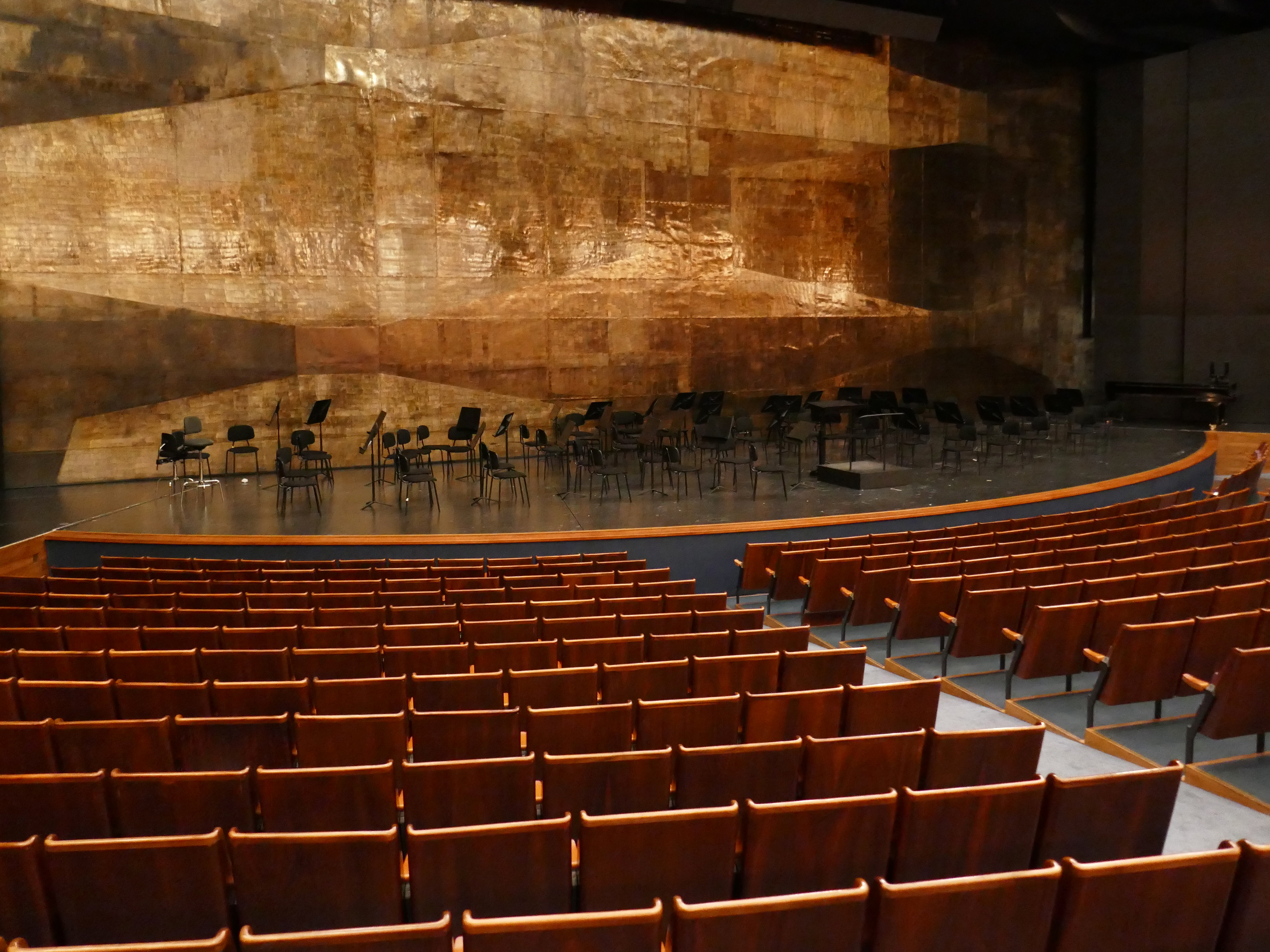 Großes Festspielhaus Salzburg, Zuschauersaal / Bühne.